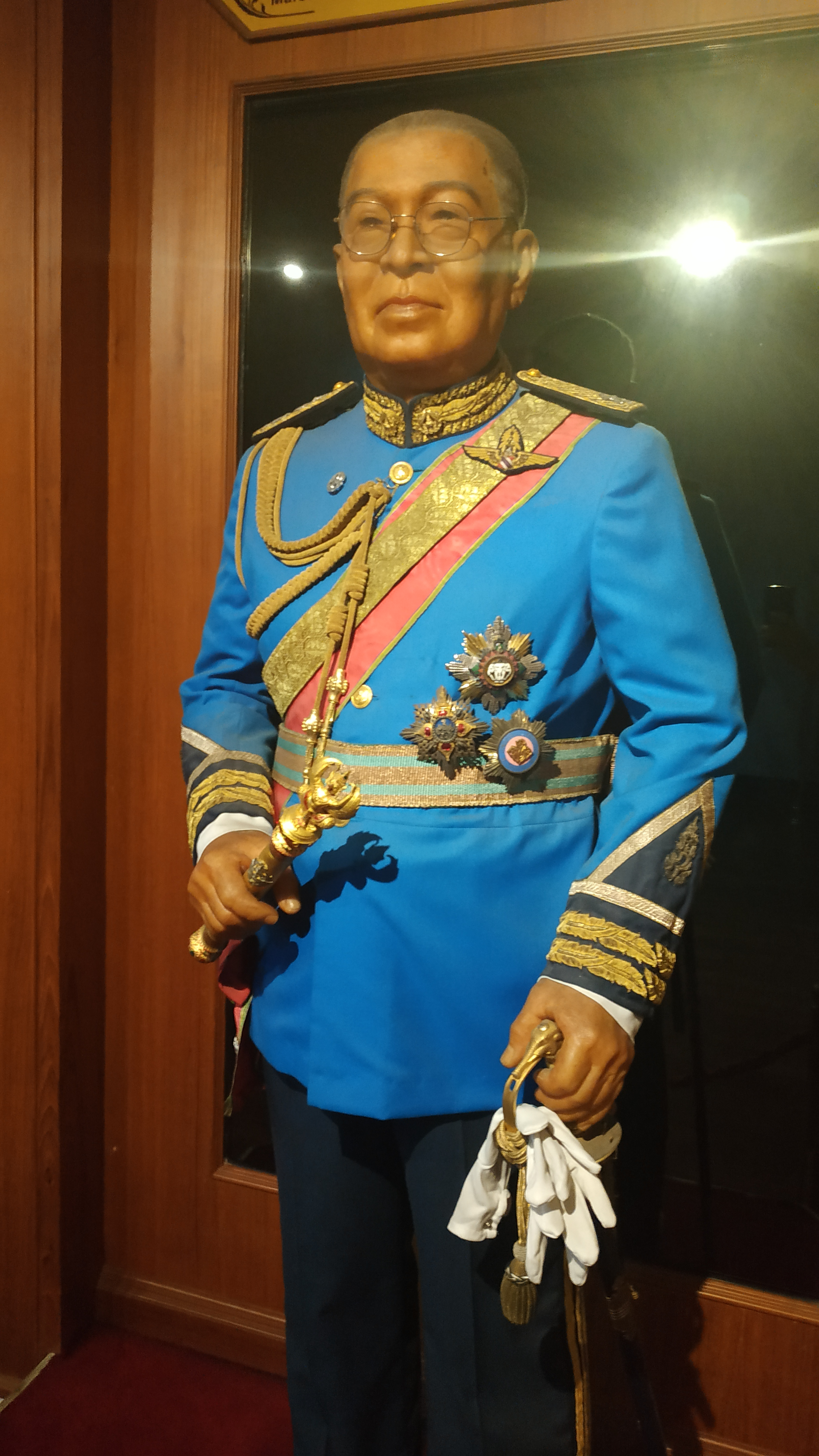 ประติมากรรมหุ่นขี้ผึ้งเต็มตัว จอมพลอากาศฟื้น รณภากาศ ฤทธาคนี (ขุนรณภากาศ) ในชุดเครื่องแบบเต็มยศนายทหารอากาศสัญญาบัตรแห่งกรมนักเรียนนายเรืออากาศรักษาพระองค์ โรงเรียนนายเรืออากาศ จัดแสดงที่อาคารอนุสรณ์สถานแห่งชาติ ตำบลคูคต อำเภอลำลูกกา จังหวัดปทุมธานี